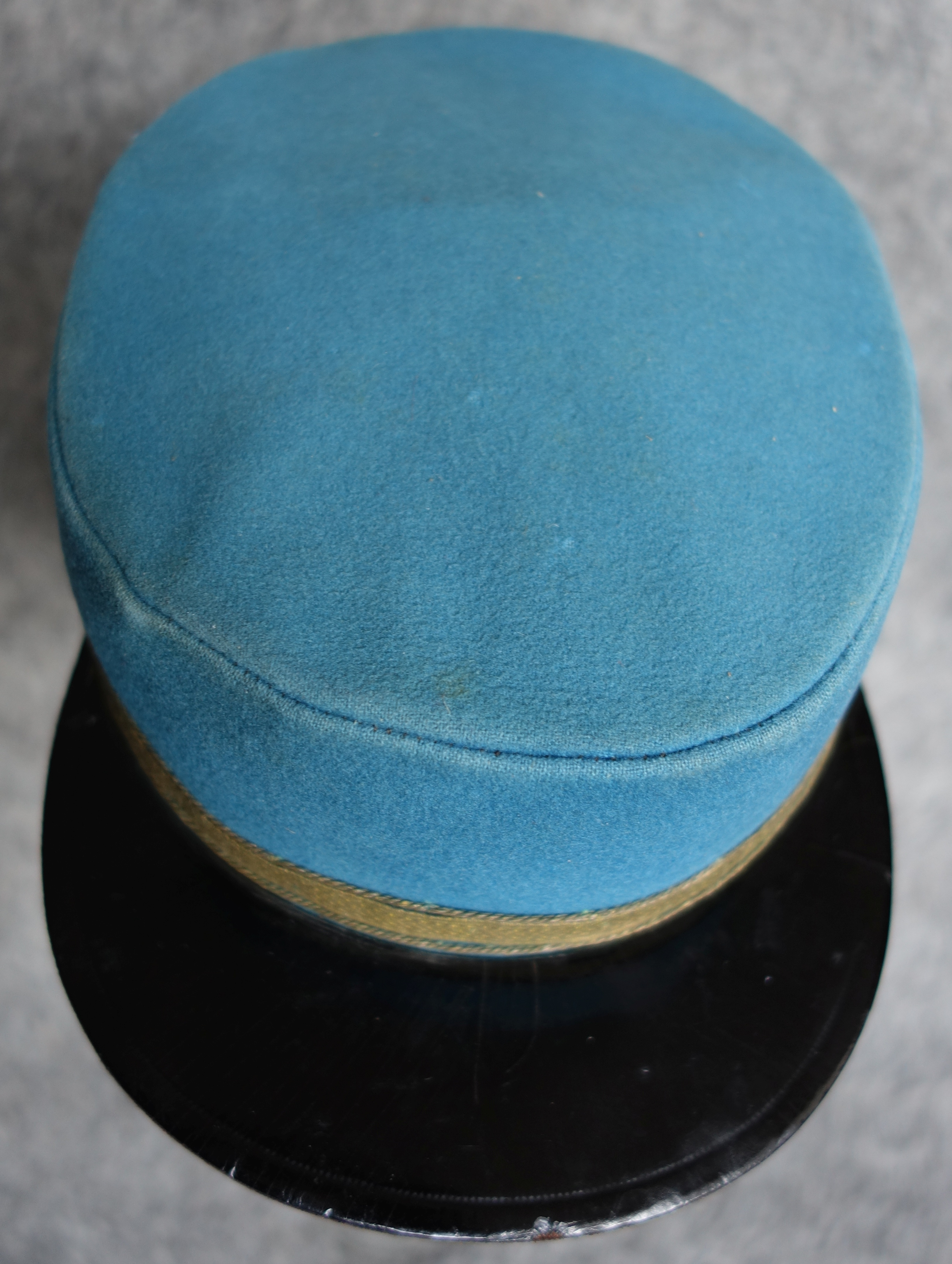 Franz Herbst, Hof-Kürscher, Braunschweig - Pagen(?)-Mütze. Besitzer-Namensschild „F. Scholz IIbM.“ Franz Herbst, Hof-Kürscher, Braunschweig - Pagenmütze (6).jpg